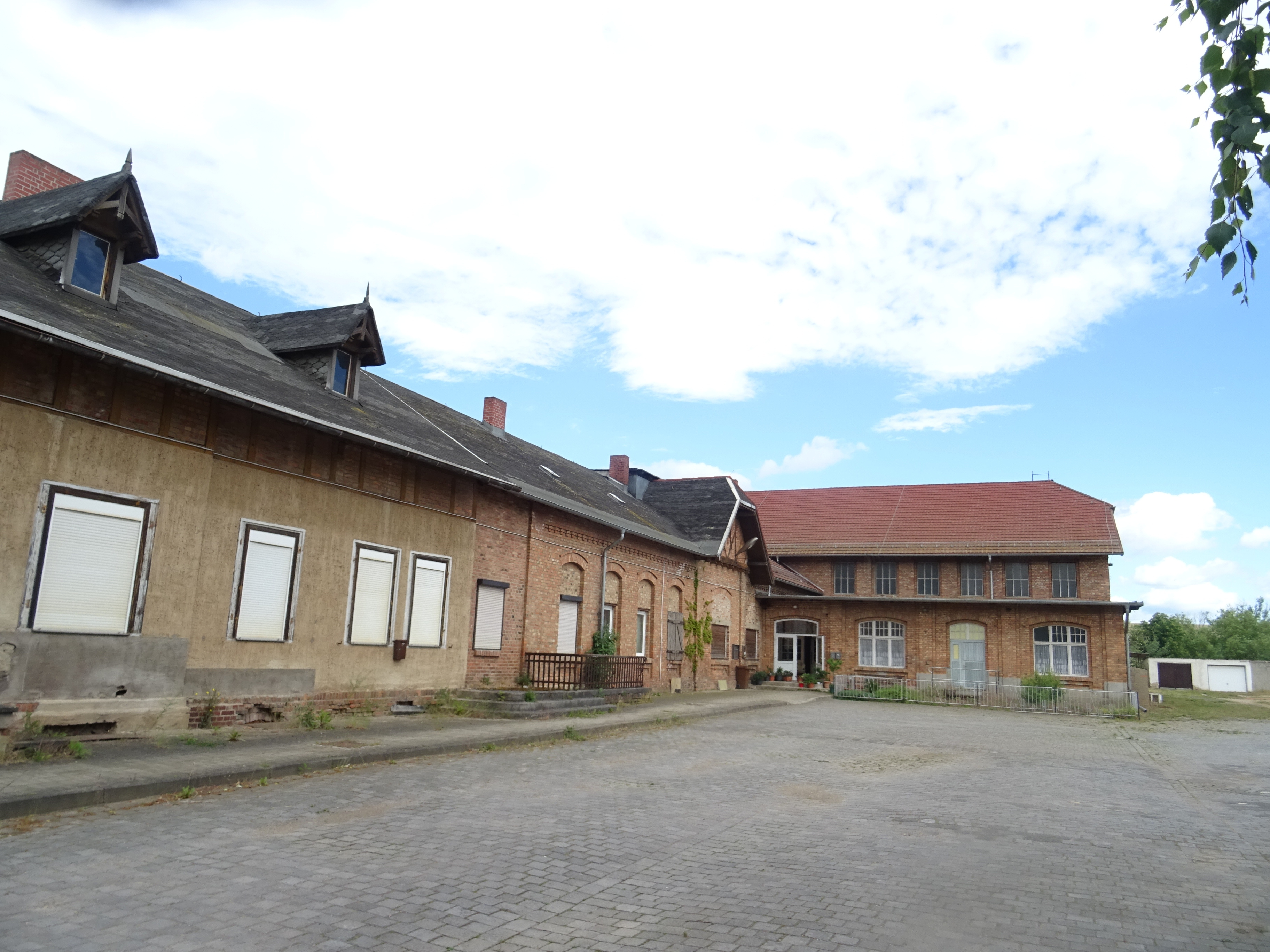 Groß Schierstedt, Ortsteil von Aschersleben denkmalgeschützte Reste des Kalibergwerks Schmidmannhall